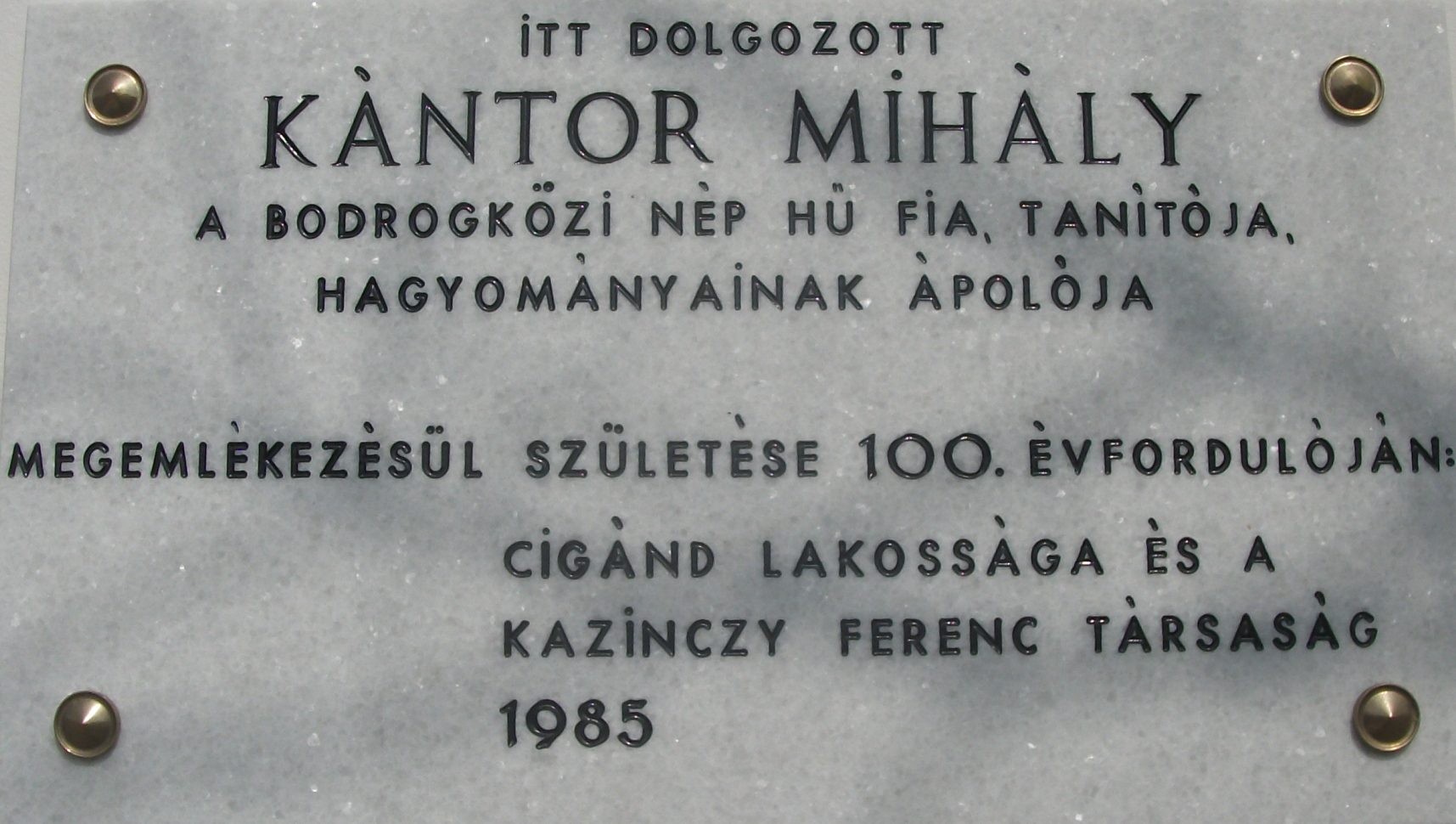 Kántor Mihály (1885-1968) tanító, a Bodrogköz néprajzi gyűjtője születésének centenáriumára átadott emléktábla, egykori munkahelyének homlokzatán.